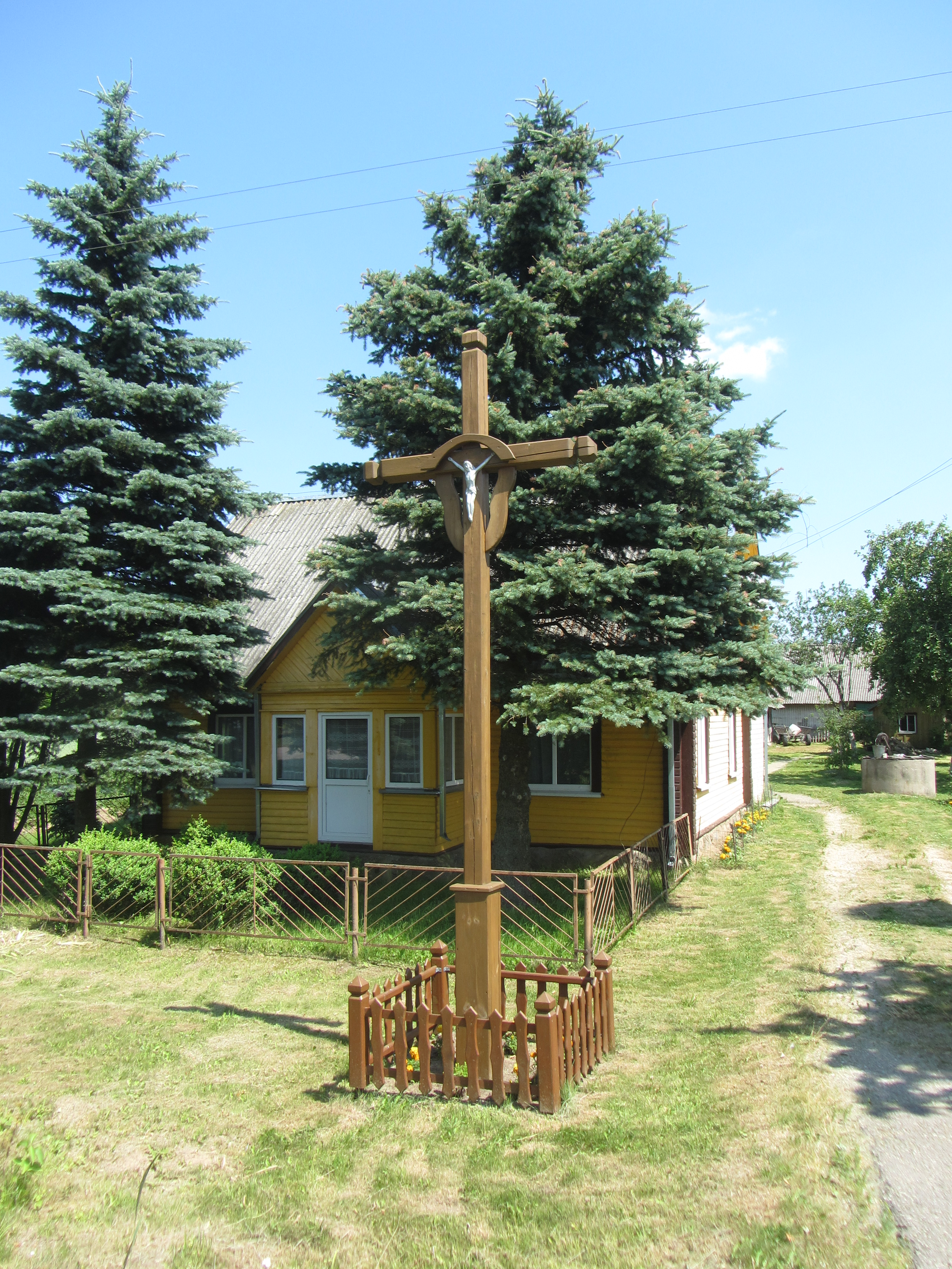 Anciūnai 19100, Lithuania